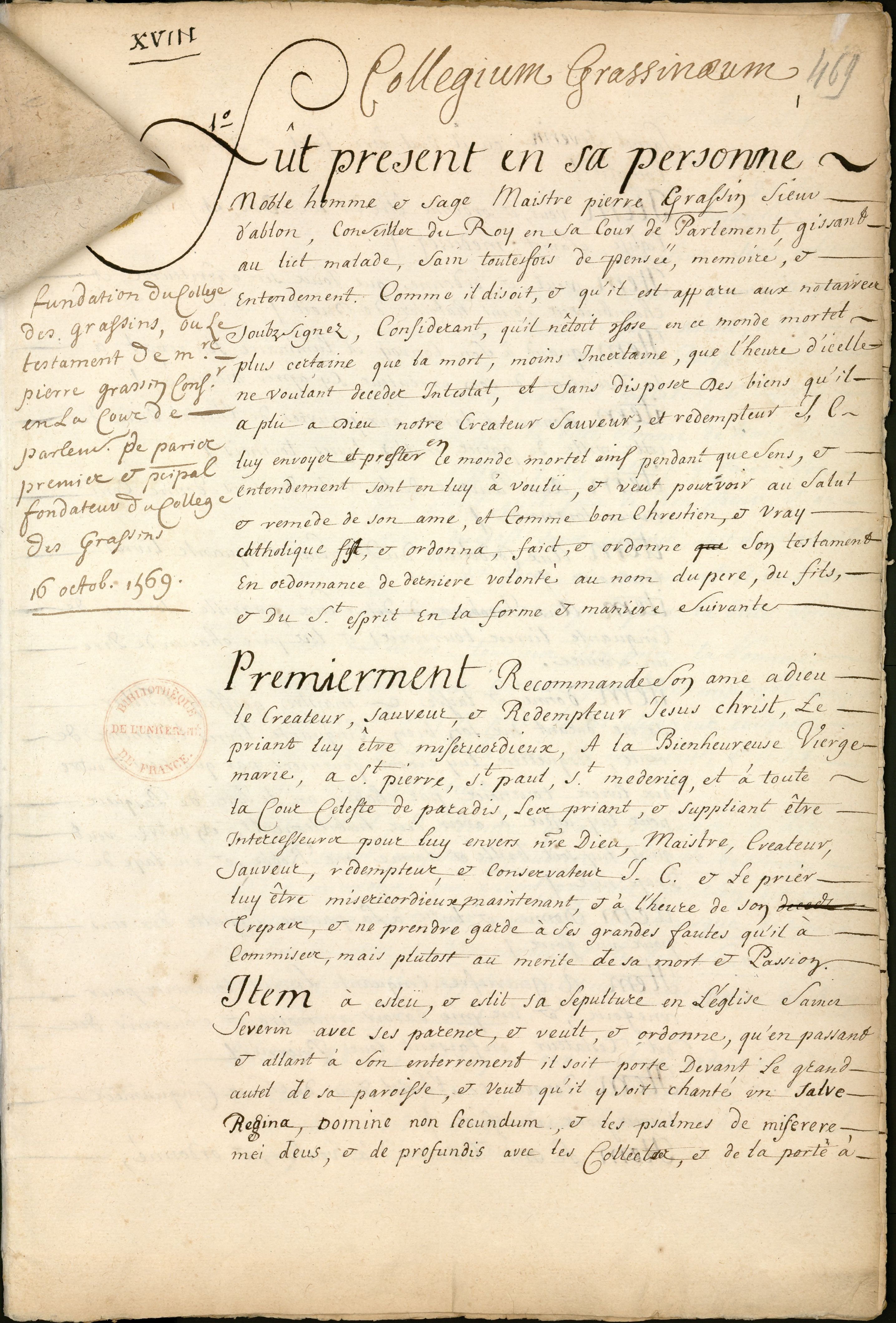 Manuscrit, dans un registre de 738 feuillets consacré aux fondations et statuts des collèges.